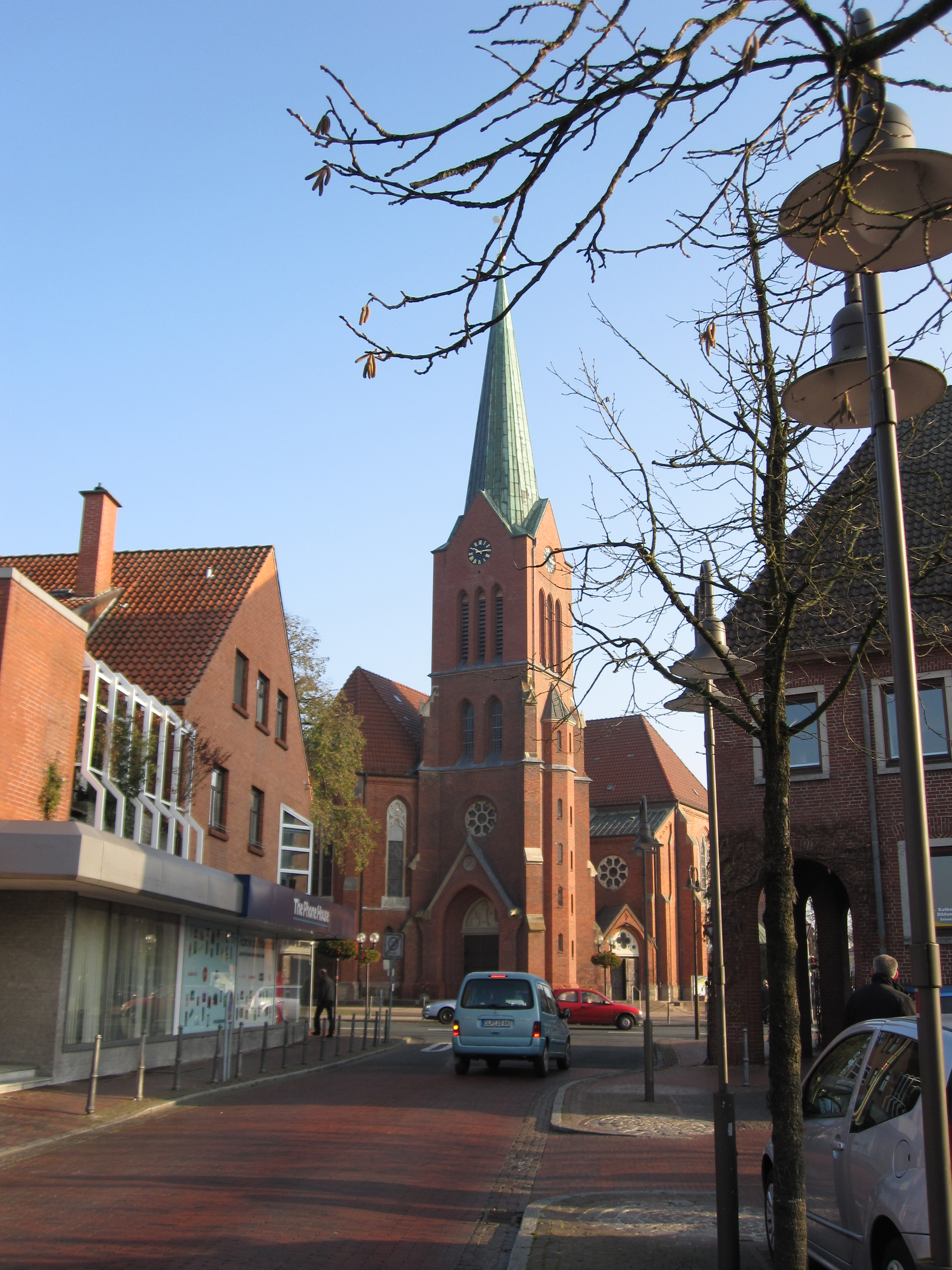 Stadtzentrum mit Marienkirche